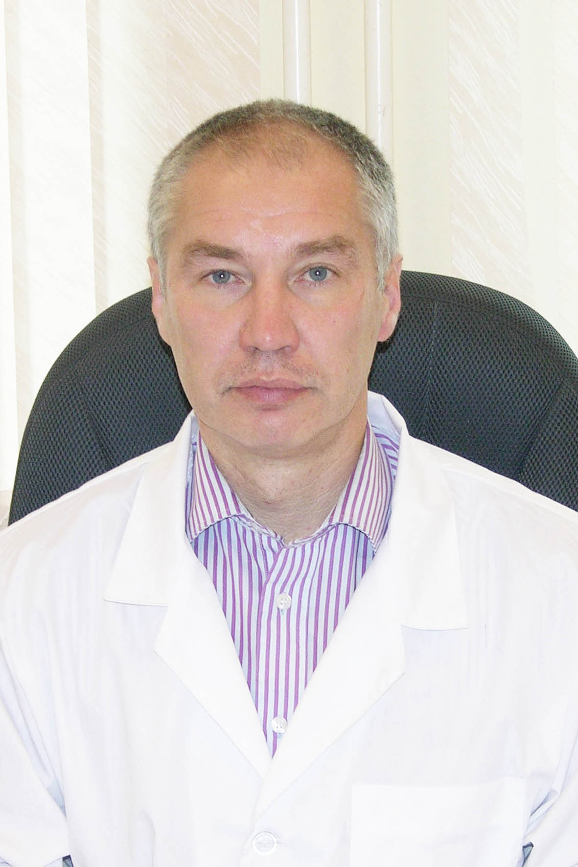 Первый заместитель главного врача по организации медицинской помощи населению в Томском Областном Перинатальном Центре